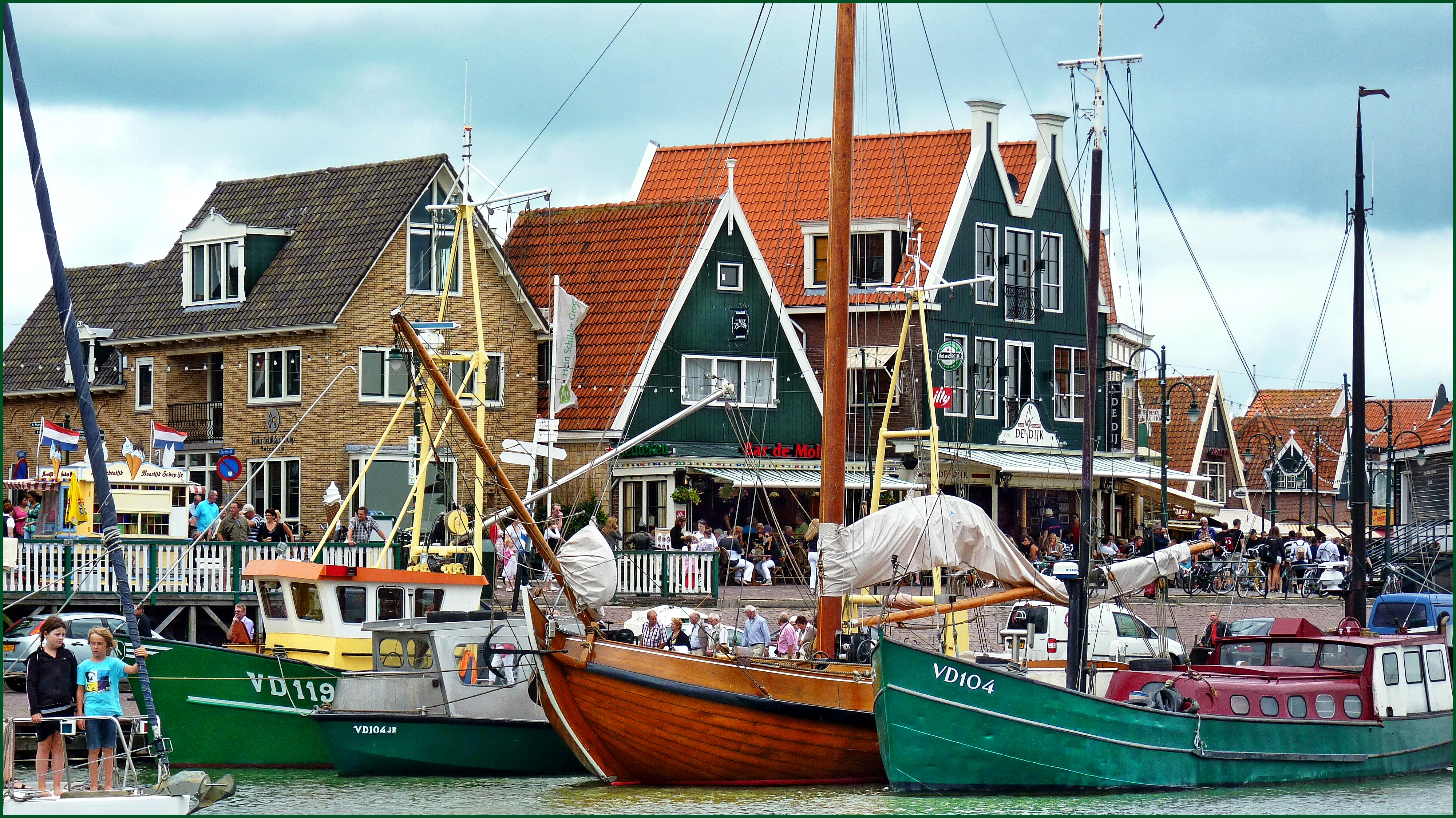 Volendam - Paesi Bassi